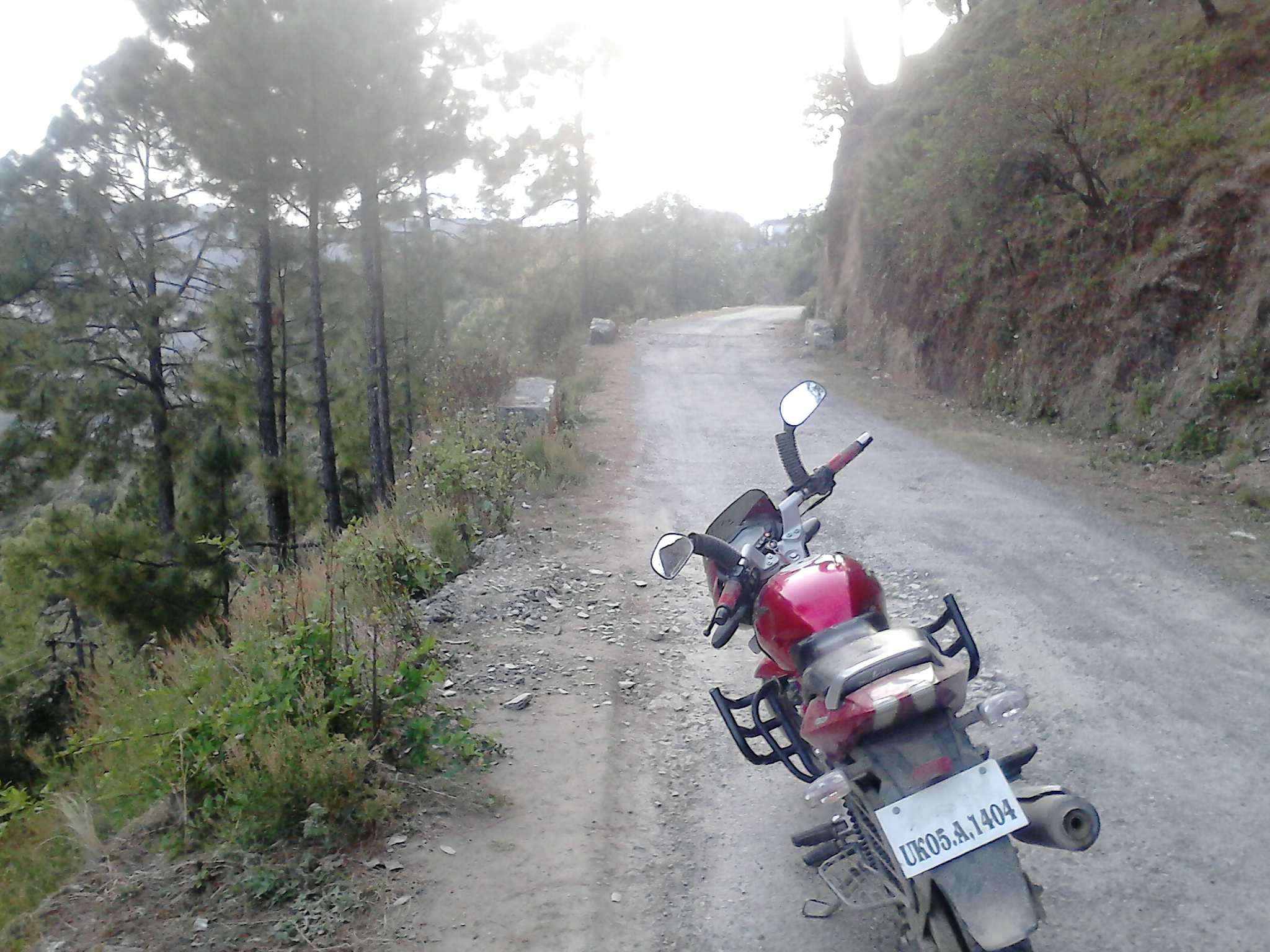 Inder@xxxMambo